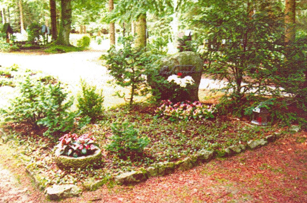 Waldfriedhof Icking-Gert Fröbe